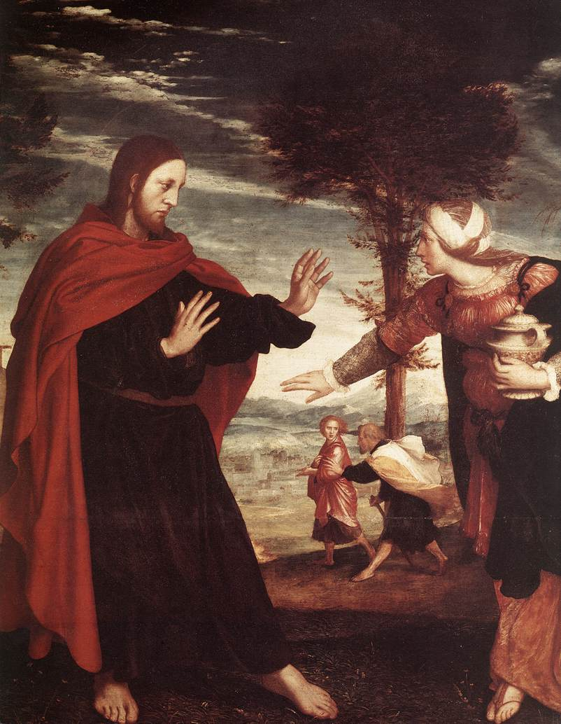 detail